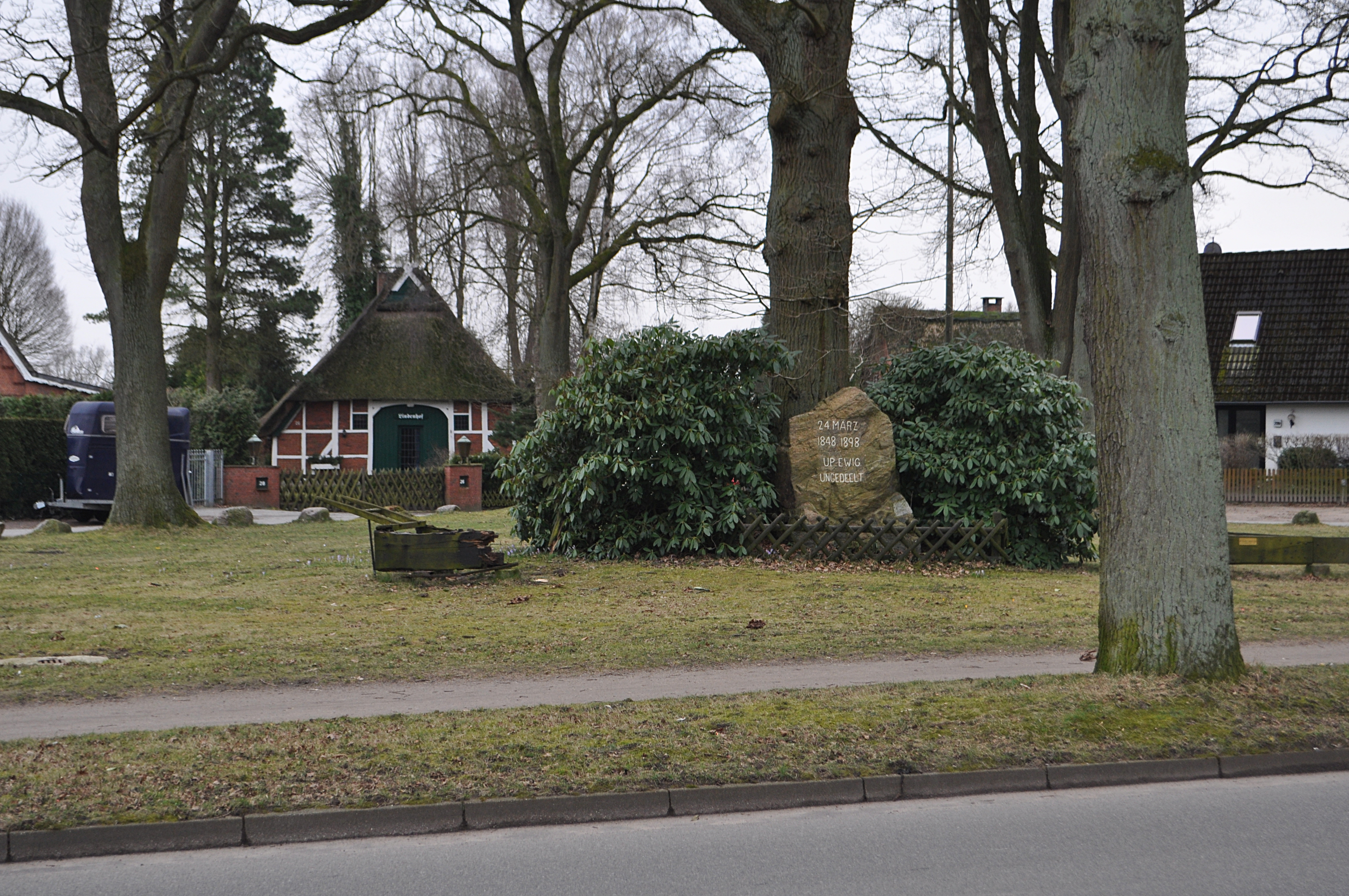 Dorfkern Lemsahl (Hamburg-Lemsahl-Mellingstedt). This is a photograph of an architectural monument.